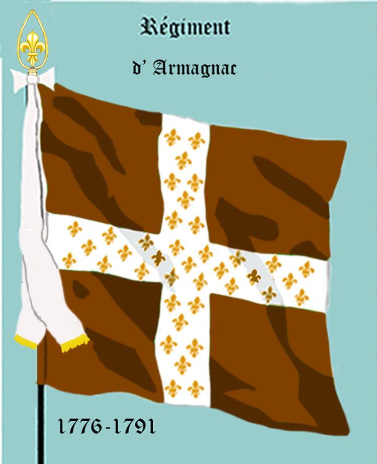 Ordonnanzfahne eines königlich französischen Infanterie-Regiments. - Entnommen und überarbeitet aus: „LES UNIFORMES ET LES DRAPEAUX DE L'ARMÉE DU ROI“ Marseille 1899. (Drapeau d'Ordonnance d' un régiment française d'infanterie royale.)